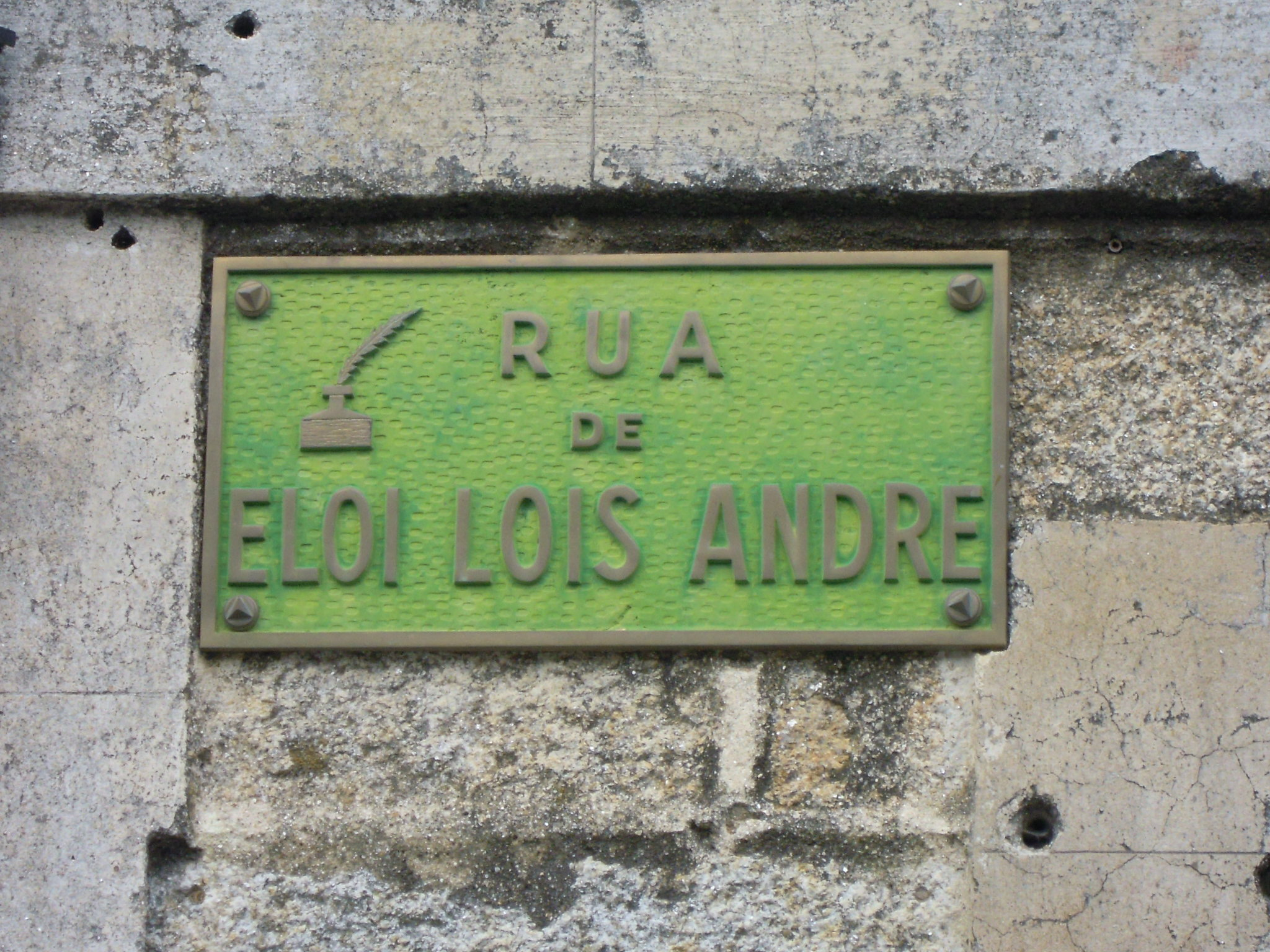 Placa na rúa de Eloi Lois André en Vilardevós.